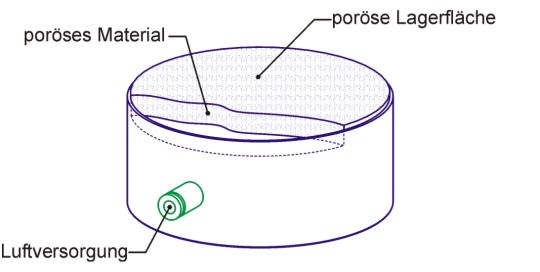 Sinterluftlager